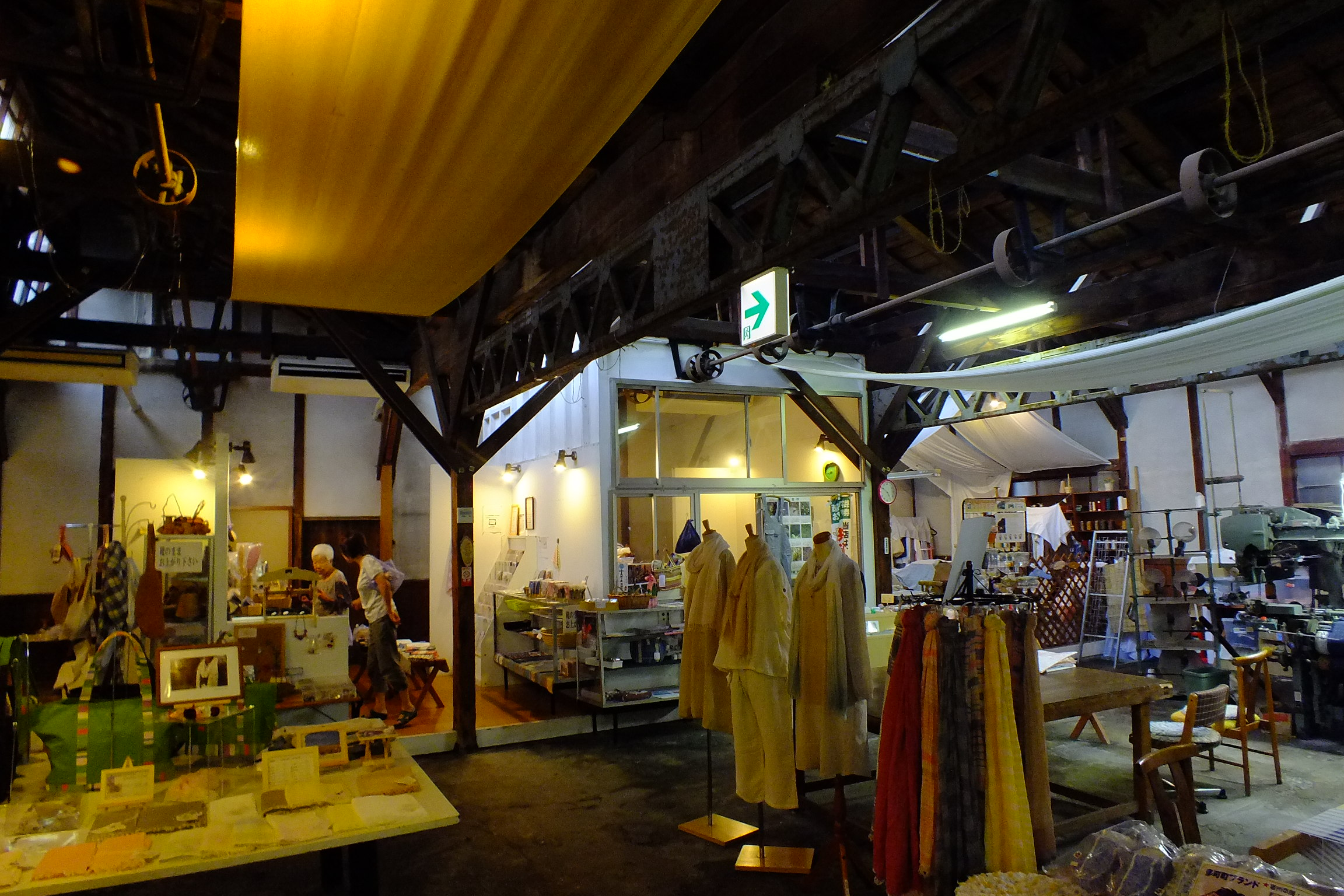 Banshu-ori kobokan 播州織工房館